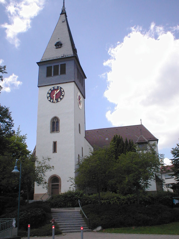 Ev. Pfarrkirche in Untergruppenbach, mit gotischem Chorturm und Kirchenschiff von 1903, erbaut unter Heinrich Dolmetsch